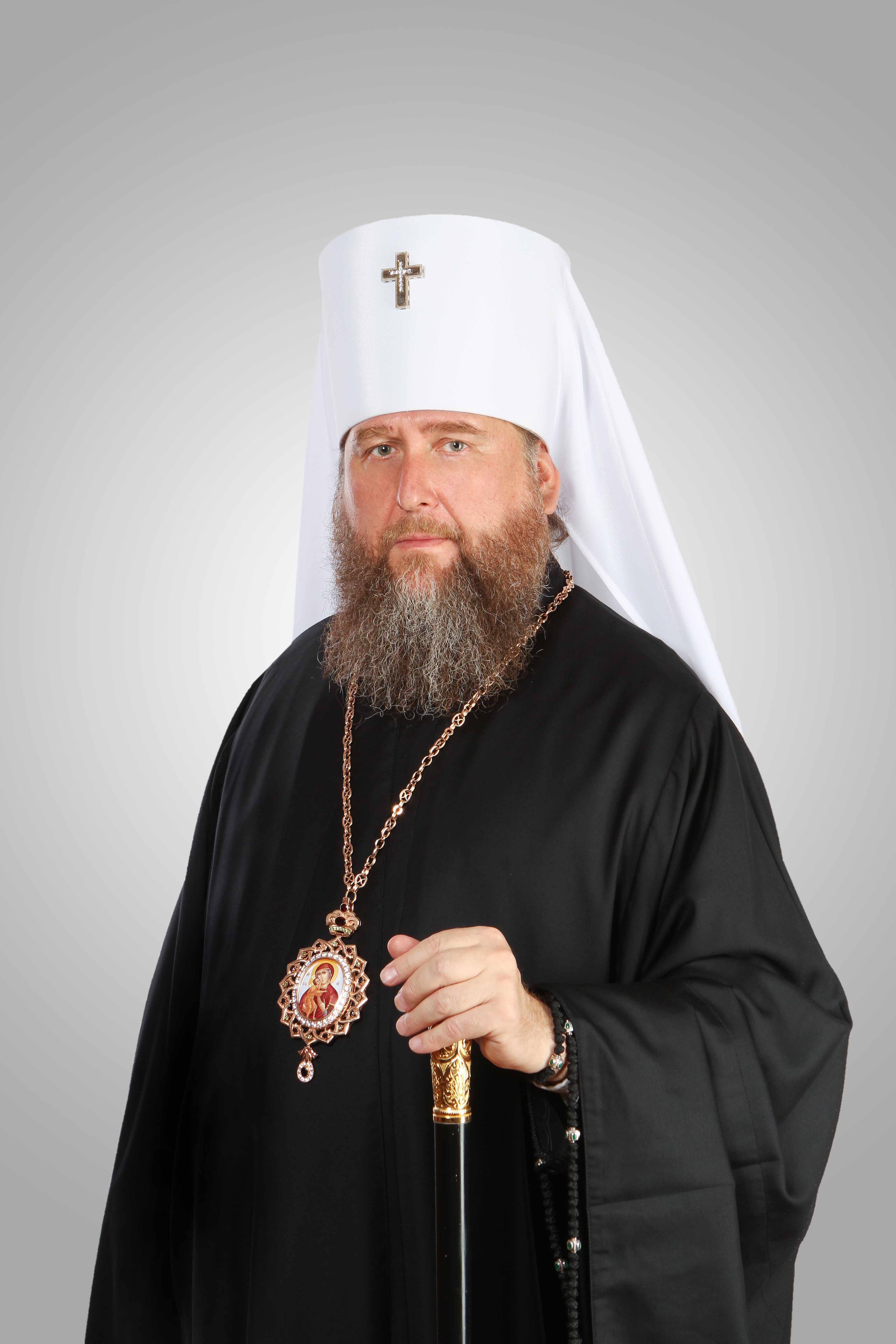 Глава Митрополичьего округа Русской Православной Церкви в Казахстане Митрополит Астанайский и Казахстанский Александр